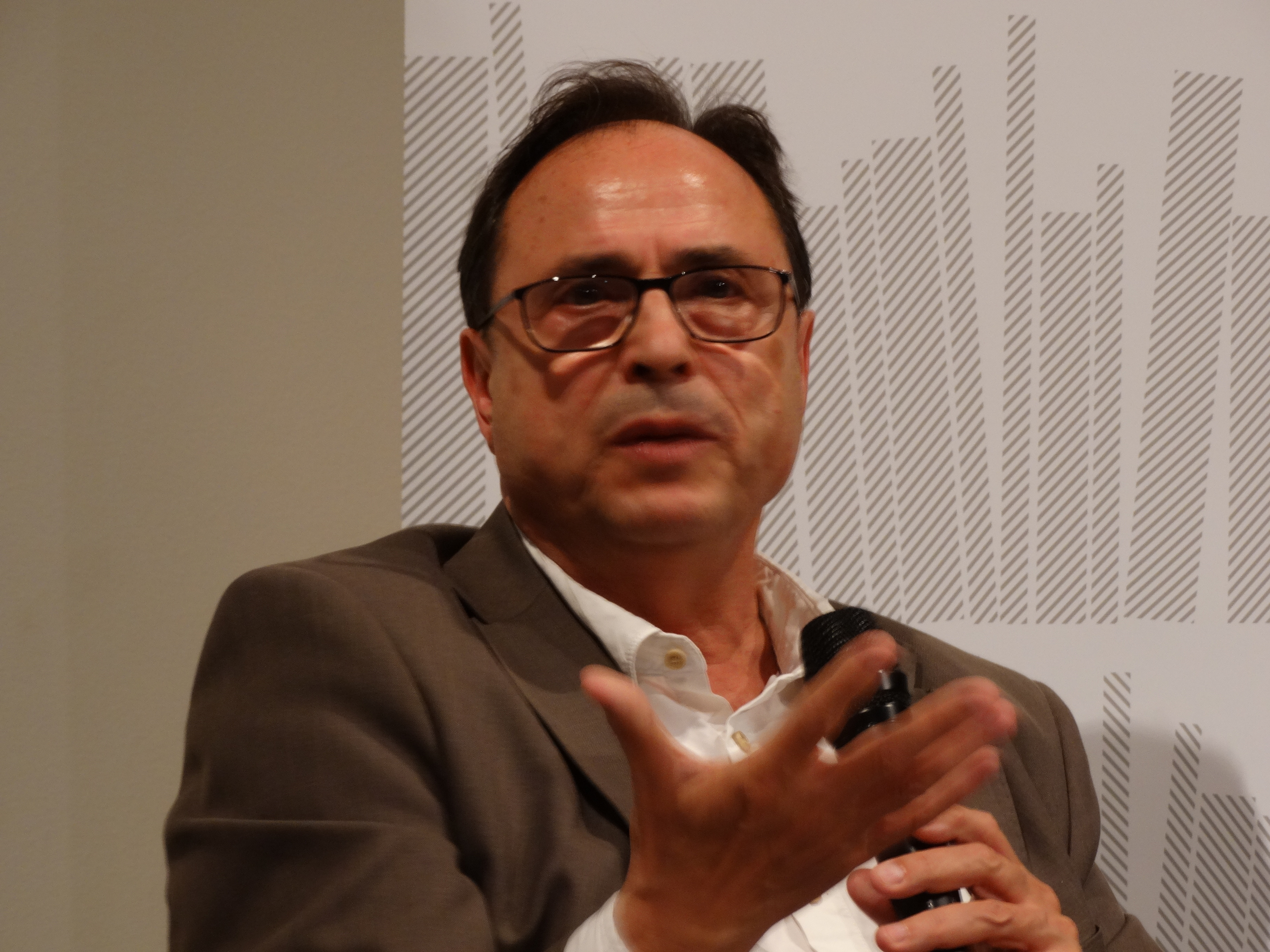 Presentació del Llibre "Socialistes d'un País imaginat". Amb Vicent Soler i Albert Girona.